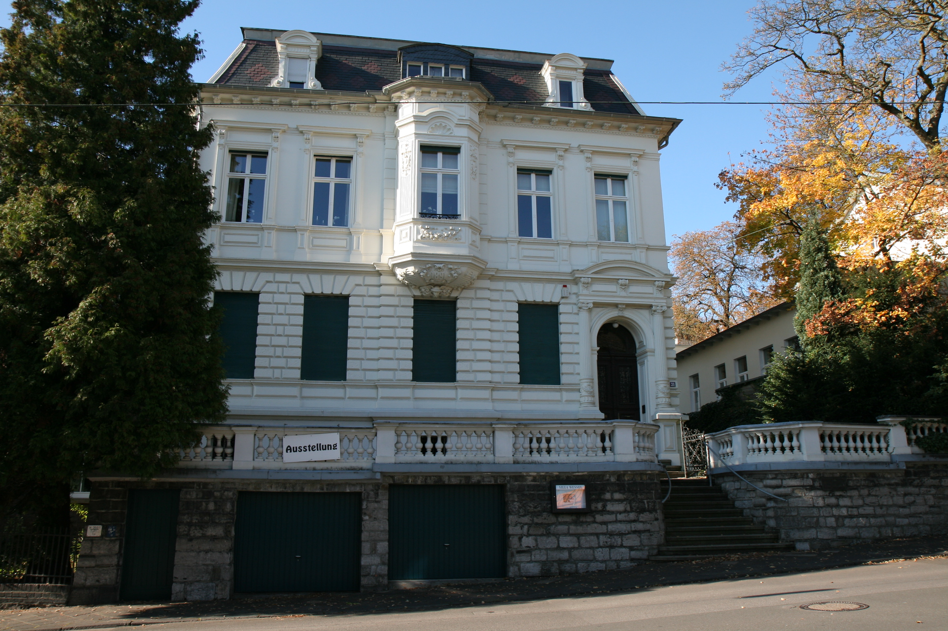 Villa Wessel in Iserlohn. This image shows a heritage building in Germany, located in the North Rhine-Westphalian city Iserlohn (no. 87).